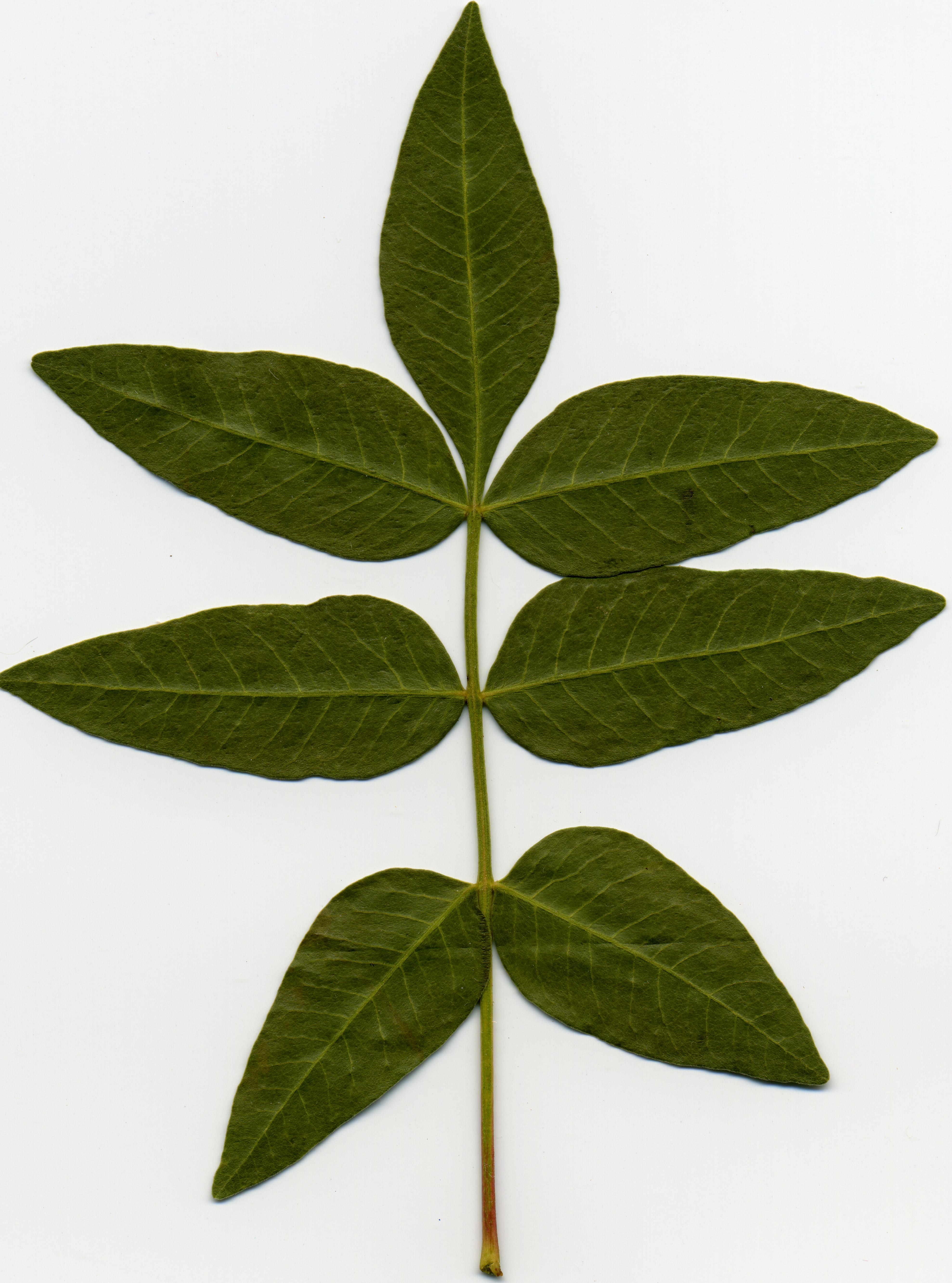 Лист растения. Растёт в Ласпинской бухте